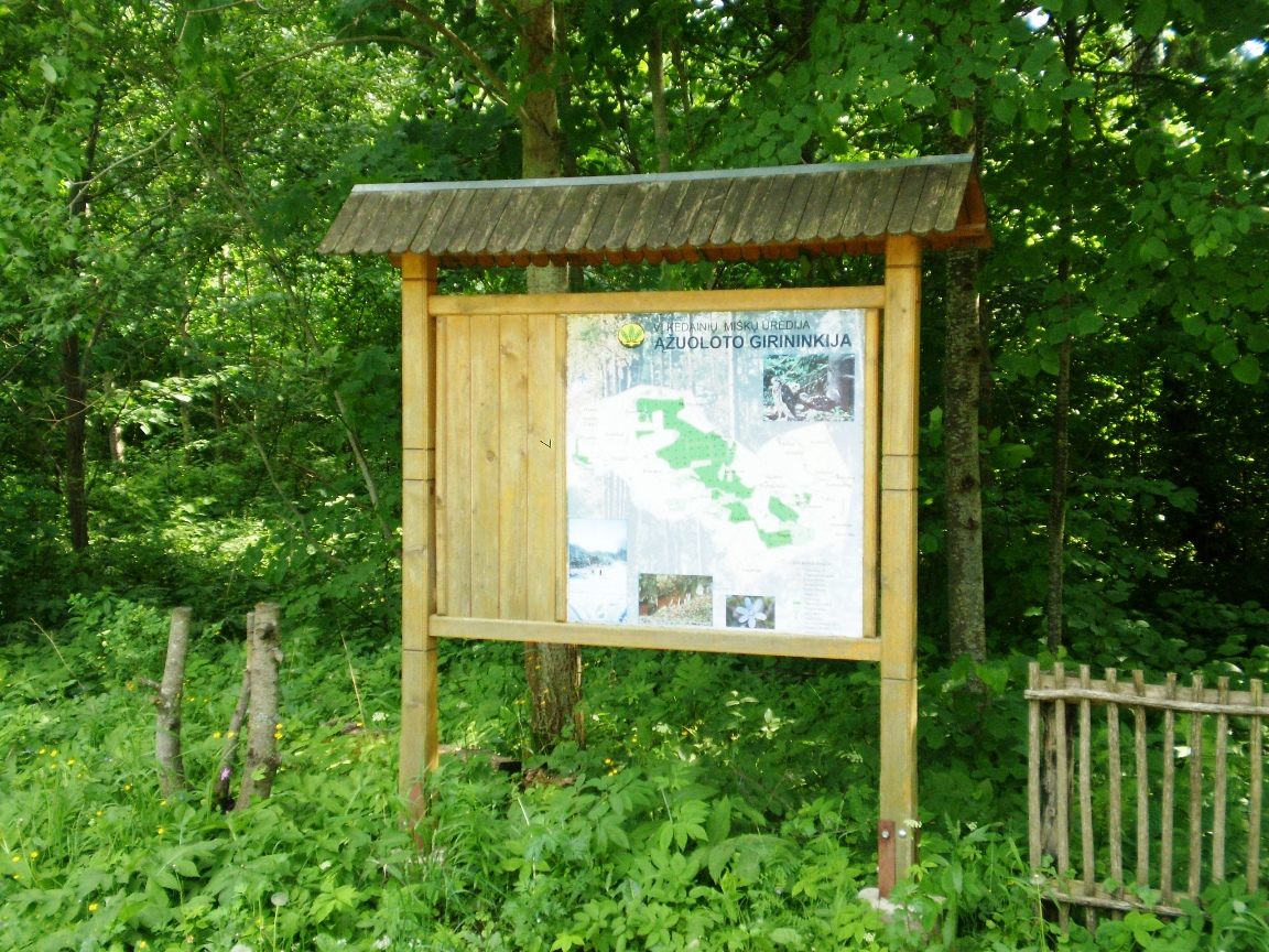 Ąžuoloto girininkijos planas, Josvainių miškas ties Palainiškiais, Kėdainių raj.